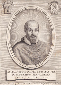 Cardinale Angelo Giori (1586-1662)